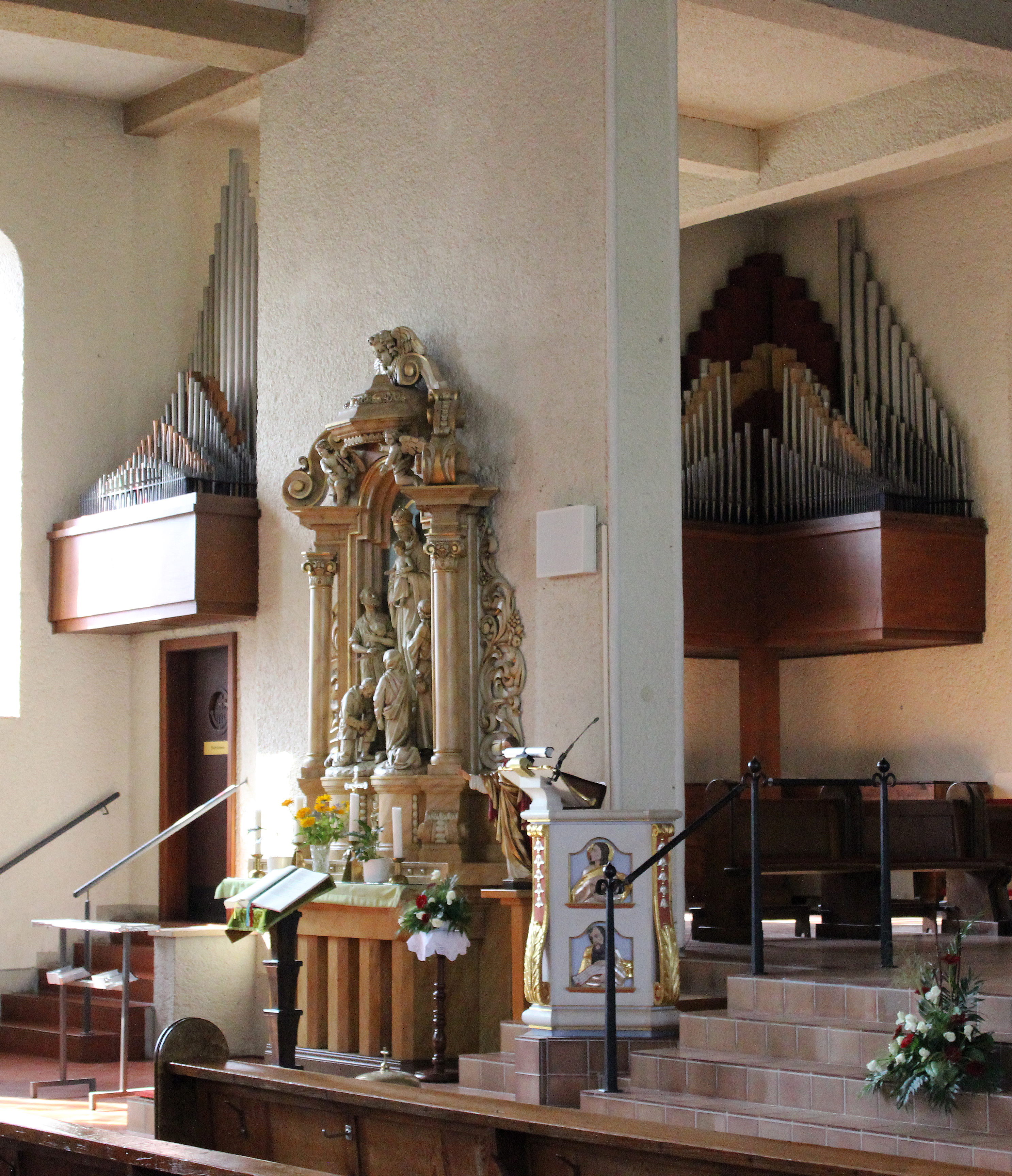 Orgelprospekt der katholischen Pfarrkirche St. Martin in Bietzen, einem Stadtteil von Merzig, Landkreis Merzig-Wadern, Saarland